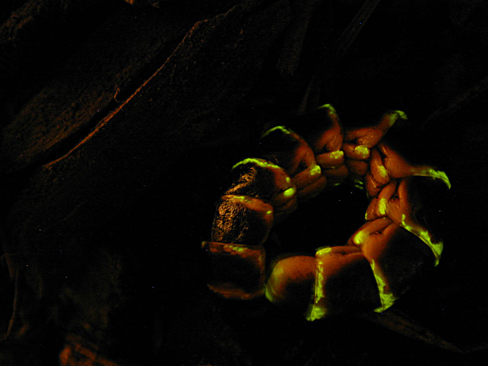 Western Glowworm (Zarhipis integripennis)